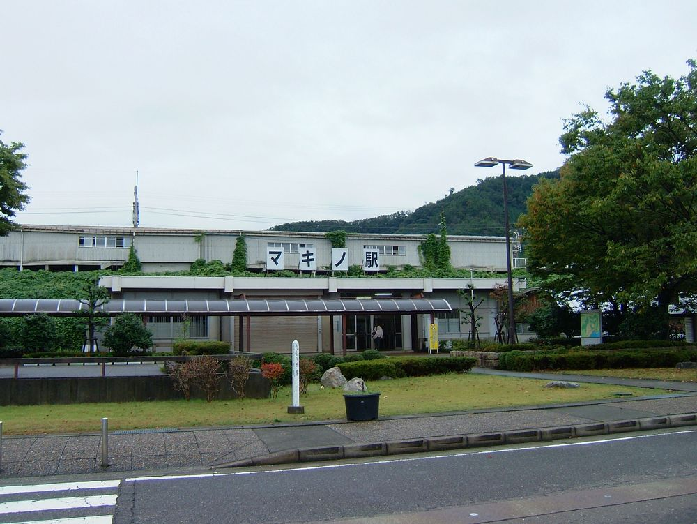 湖西線 マキノ駅の駅舎。 2006年9月8日にGACHANが撮影しました。